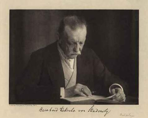 Reinhard Kekulé von Stradonitz, Klassischer Archäologe (1839-1911), Professor in Berlin und Direktor der Antikensammlung